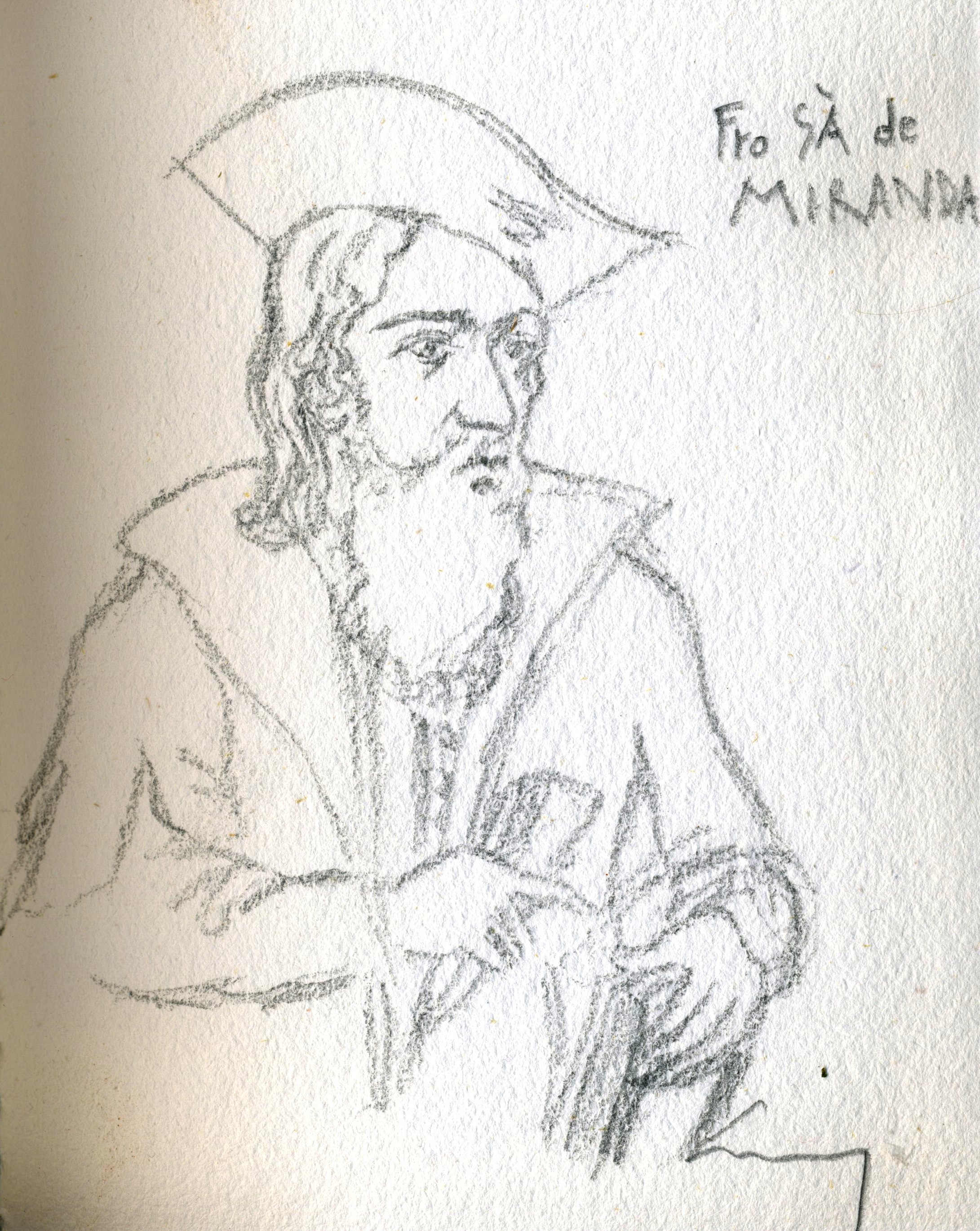 dessin de Victor Couto, d'après document